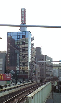 かつての両国予備校校舎跡 両国駅付近